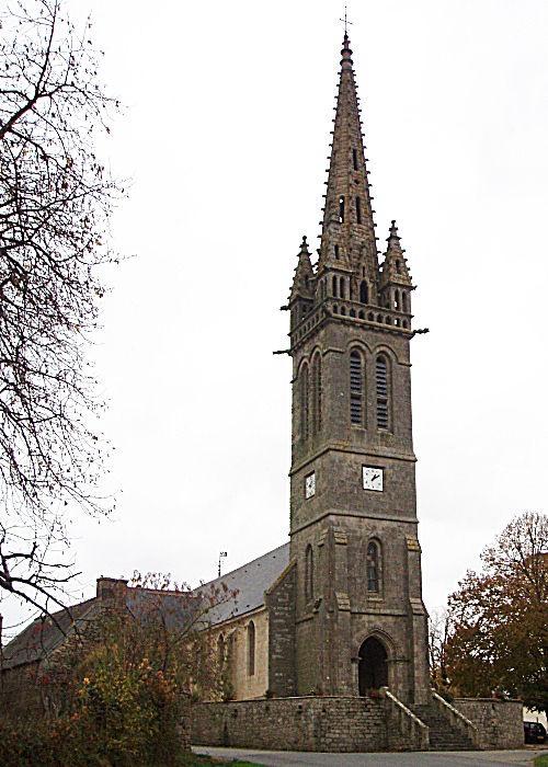 Eglise Bieuzy les Eaux